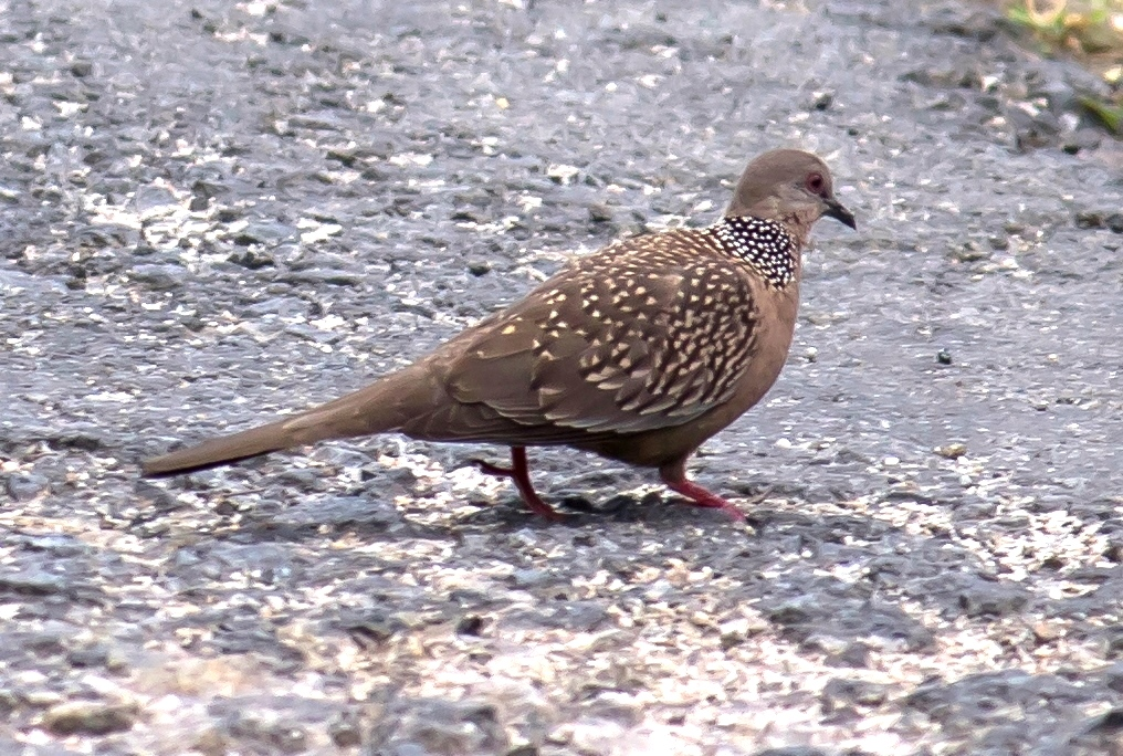 അരിപ്രാവ്